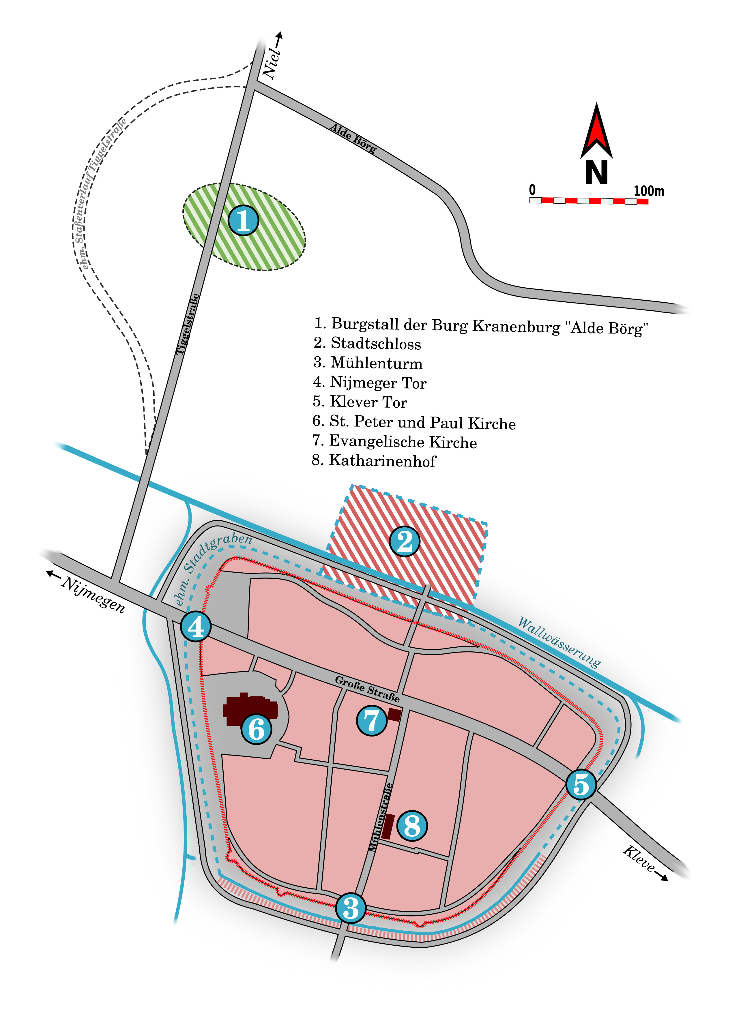 Lageplan der ehemaligen Motte "Alde Börg" und dem Stadtschloss von Kranenburg.